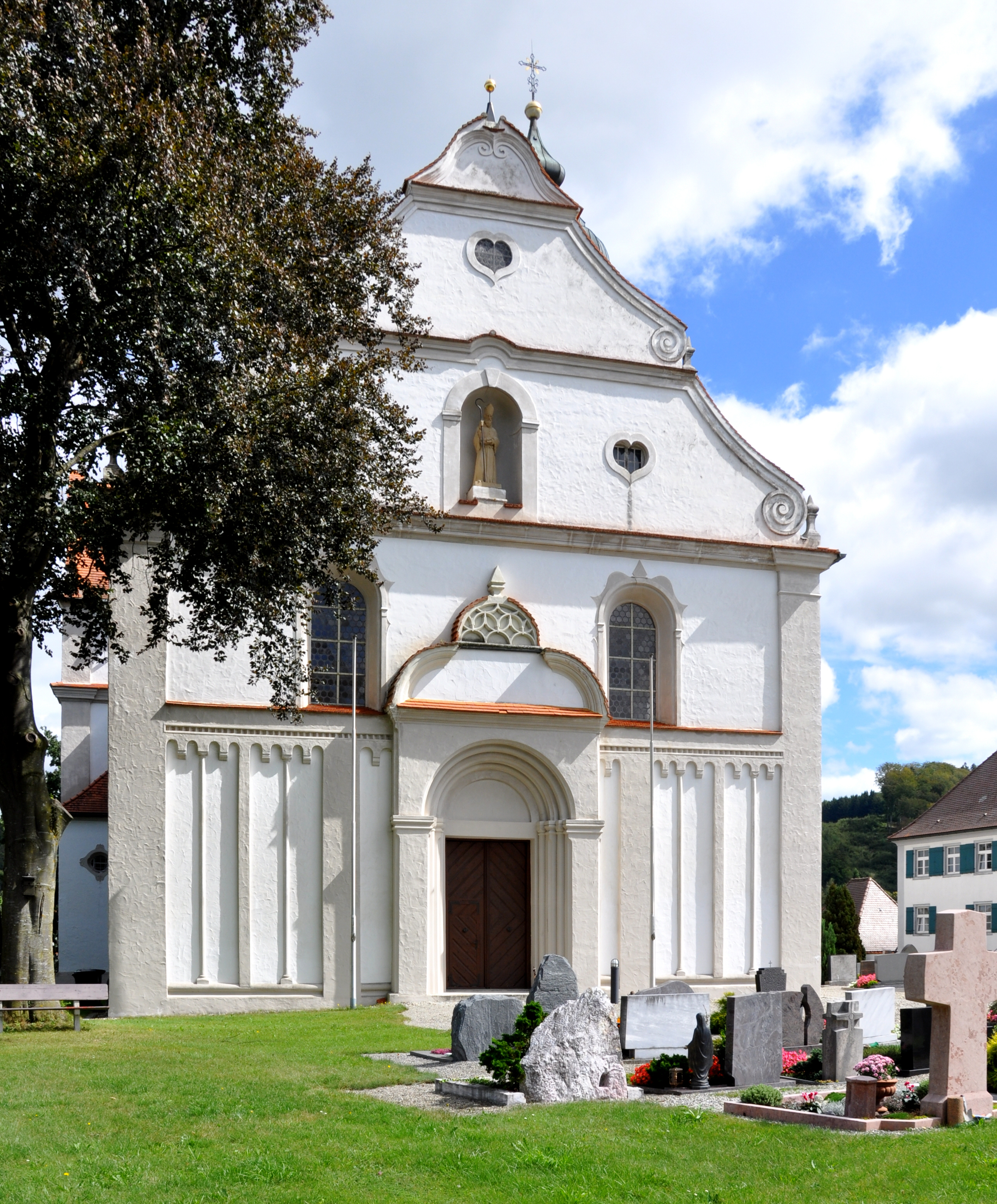 Katholische Pfarrkirche St. Martin, Unteressendorf, Gemeinde Hochdorf (Riß)